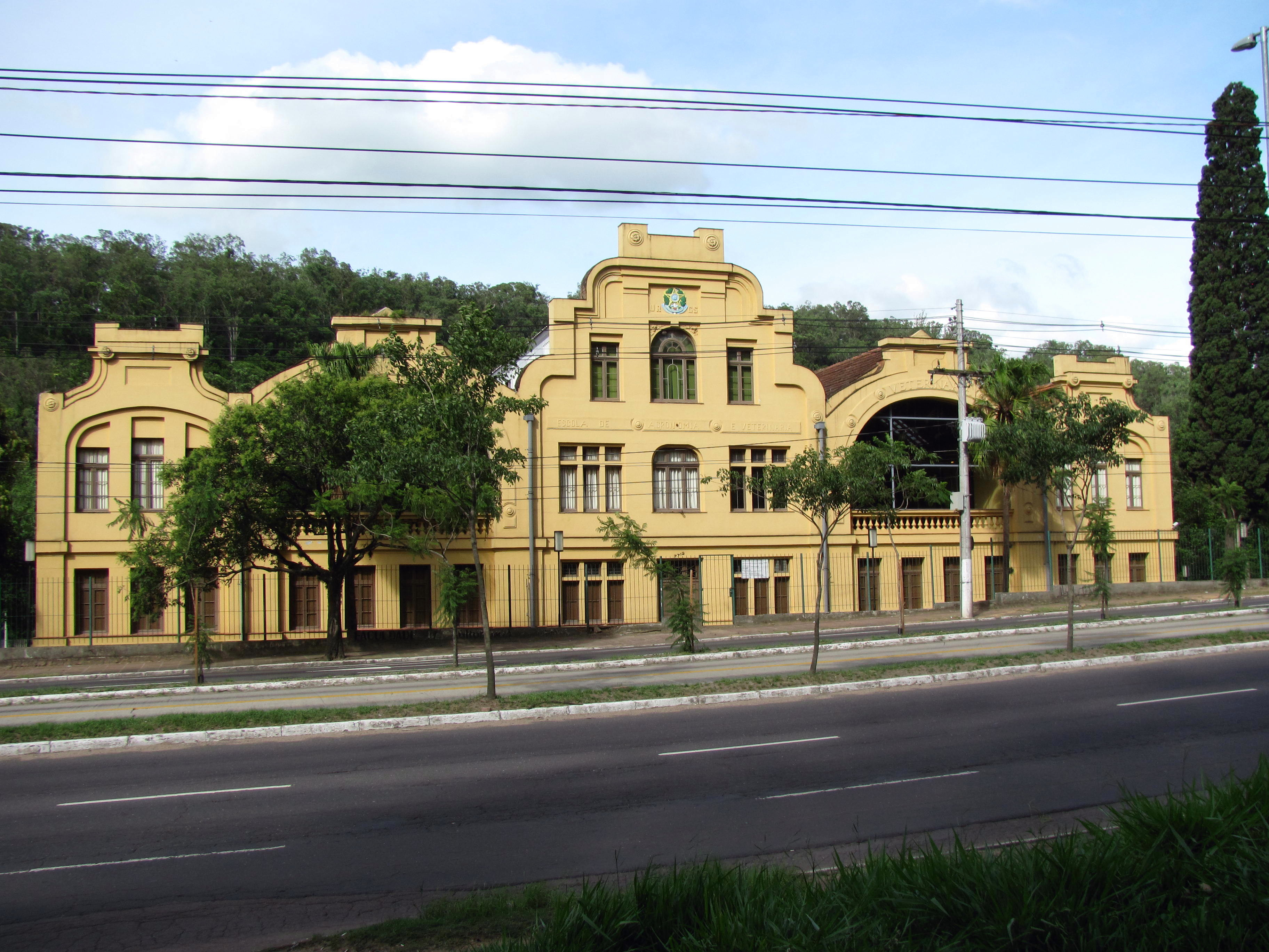 Faculadade de Agronomia da UFRGS